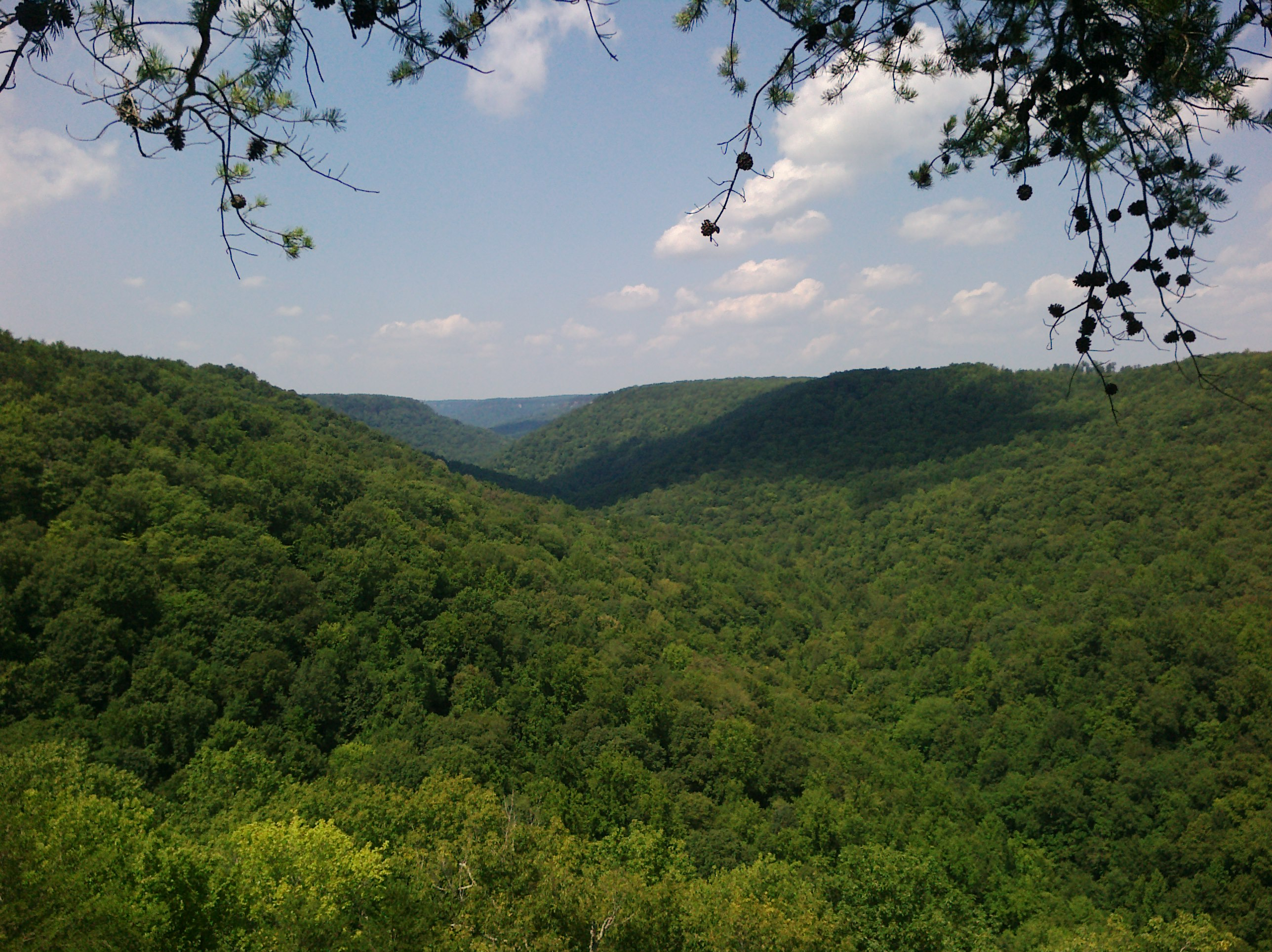 Tennessee, USA